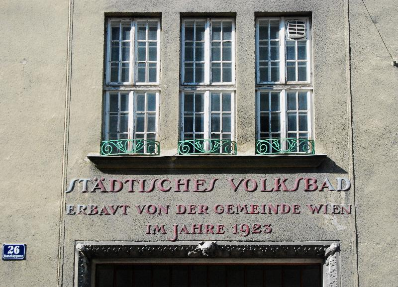 Das Ratschkybad ist ein unter Denkmalschutz befindliches und außer Betrieb stehendes Volksbad („Tröpferlbad“) im 12. Wiener Gemeindebezirk Meidling. Die Beschriftung oberhalb des Einganges.